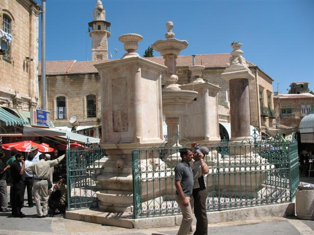 muristan fountain in Jerusalem